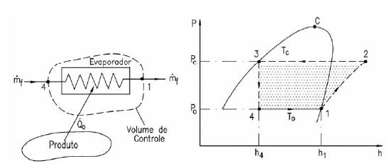 evaporador